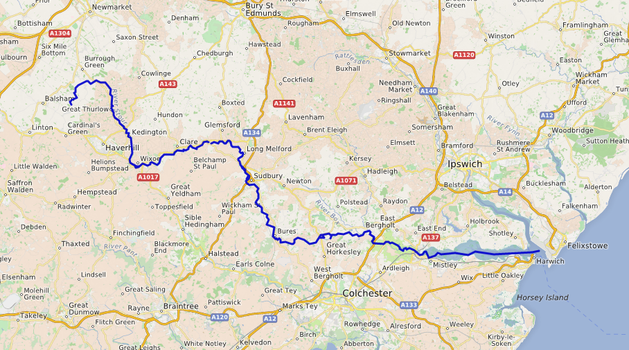 carte réalisée sur umap This map may be incomplete, and may contain errors. Don't rely solely on it for navigation.